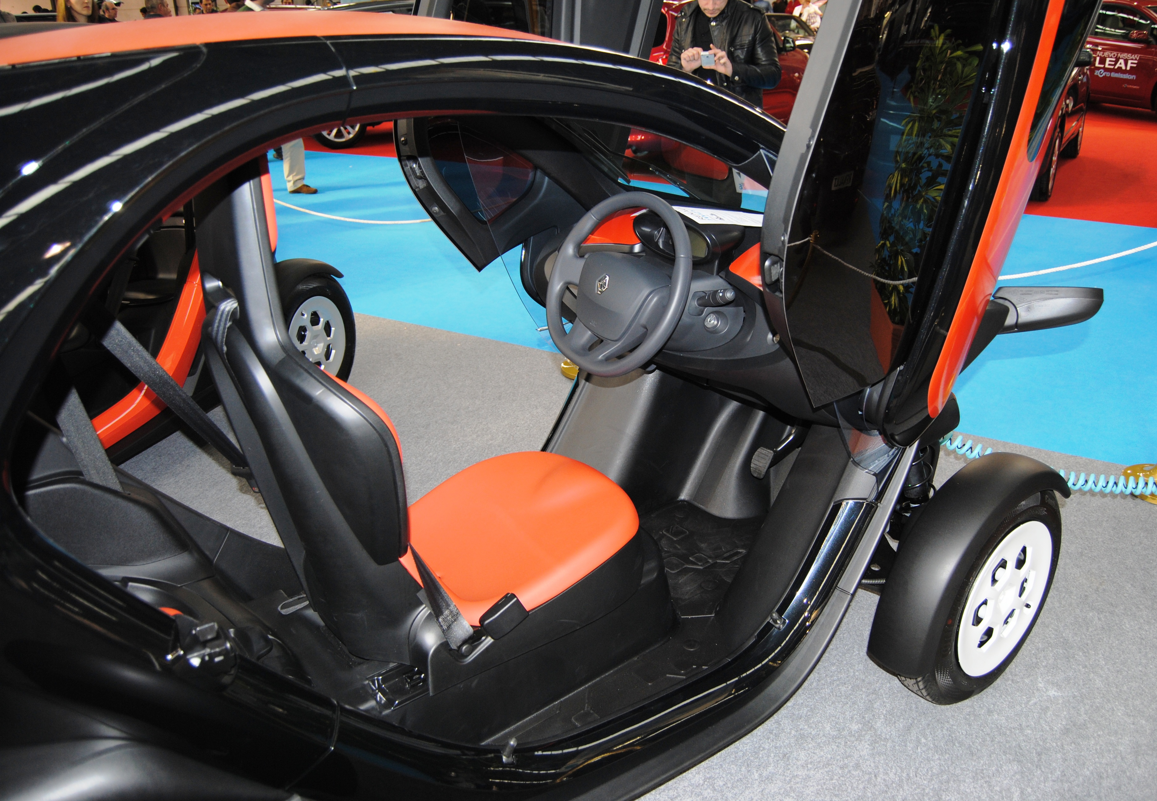 TWIZY, Salón do Automóbil 2012, IFEVI, 5